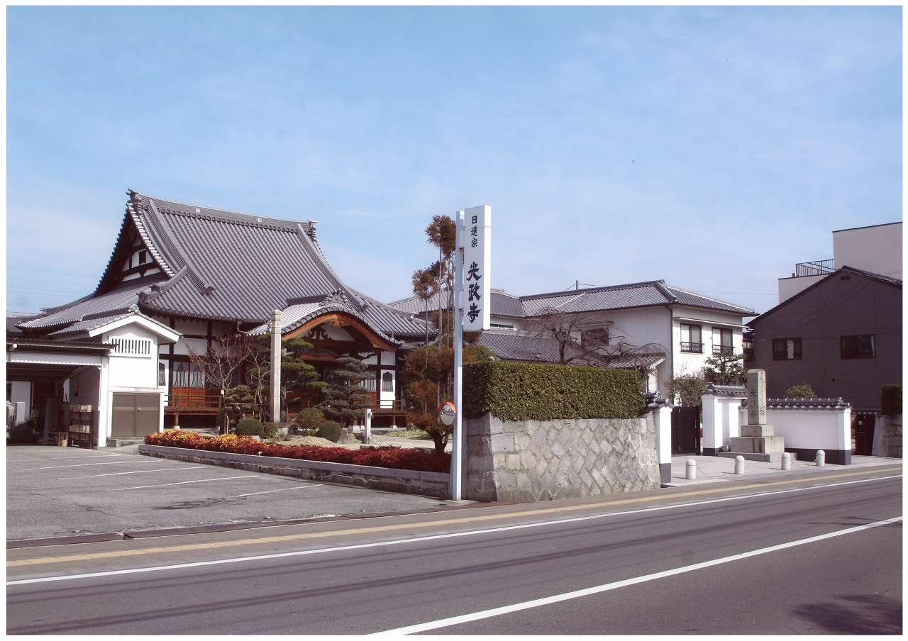 福山市寺町にある日蓮宗の寺院全景